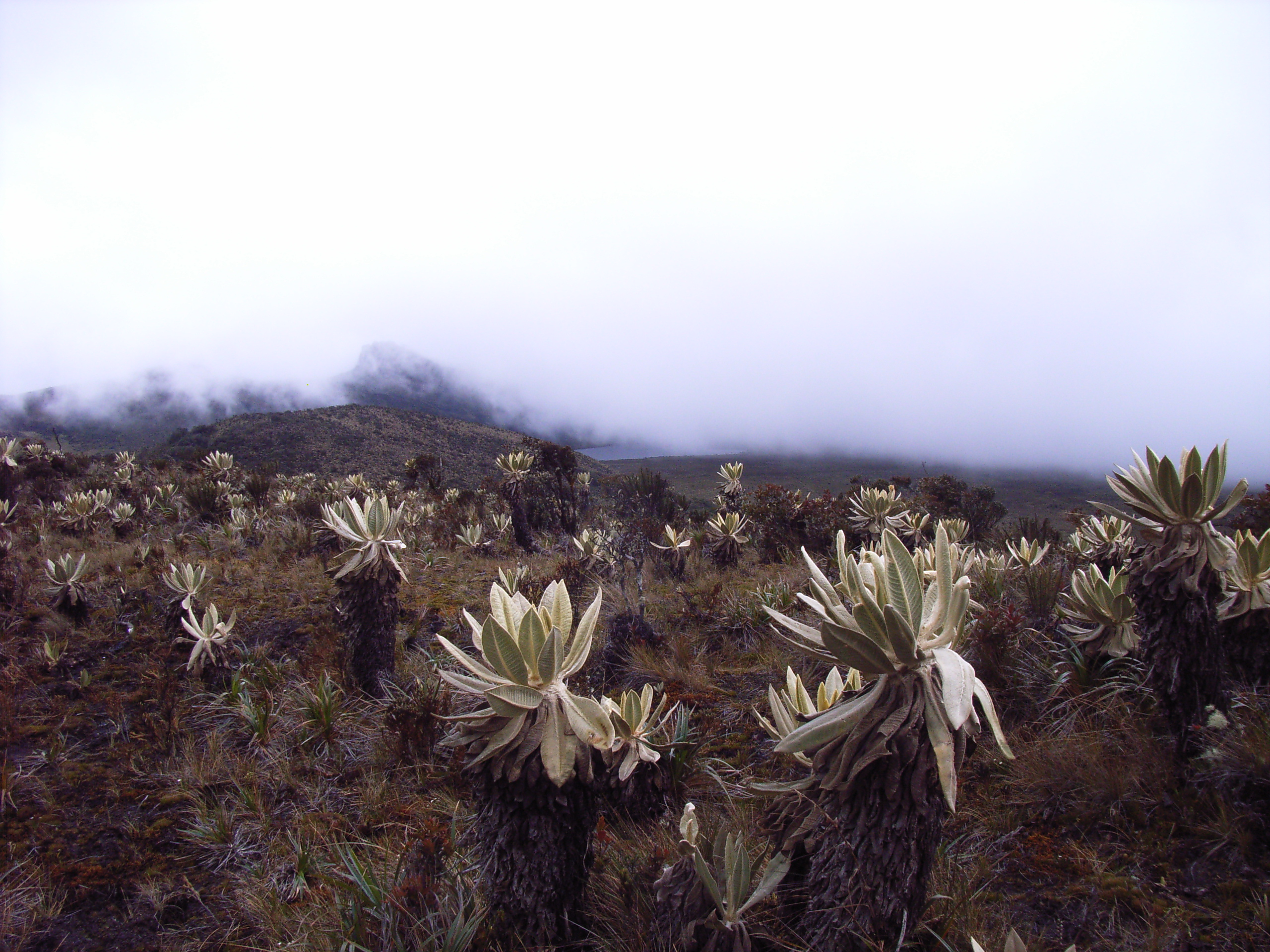 Frailejones en el Páramo de las Papas. Macizo Colombiano, Colombia.